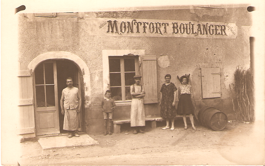 Vue de la boulangerie en 1930.